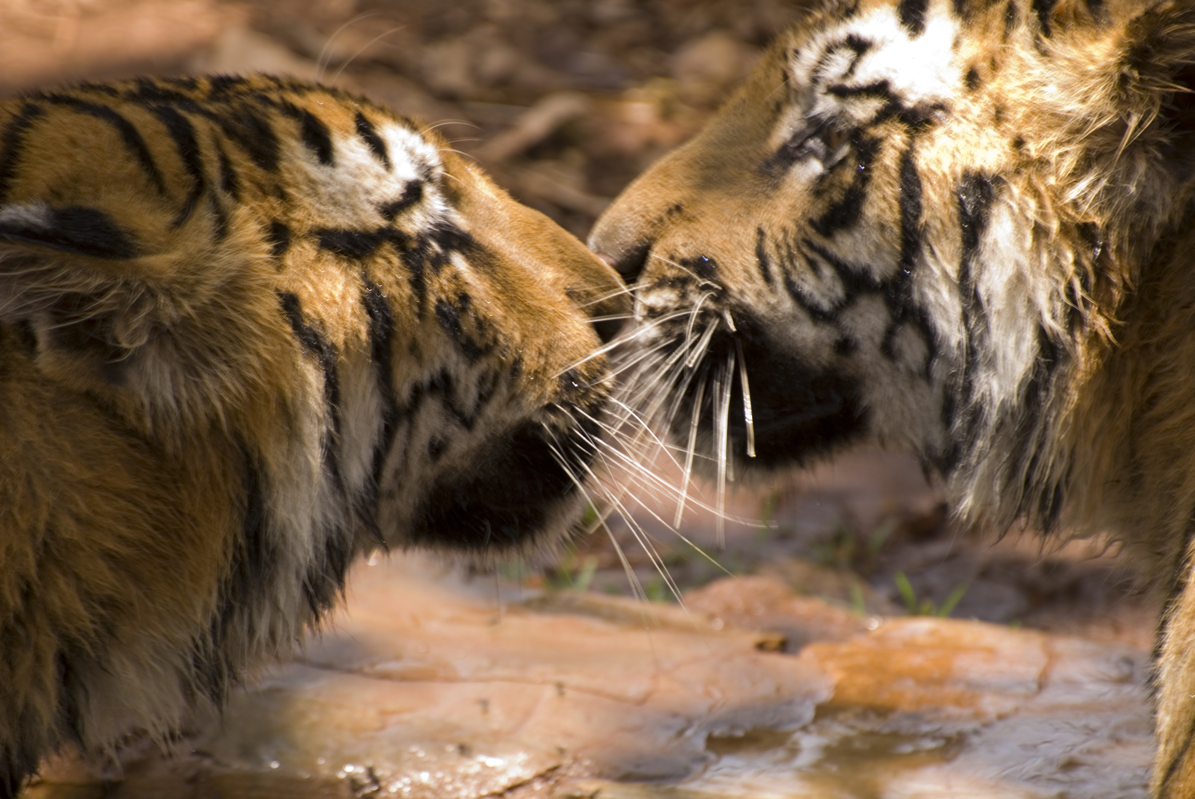 2 Bengal tigers